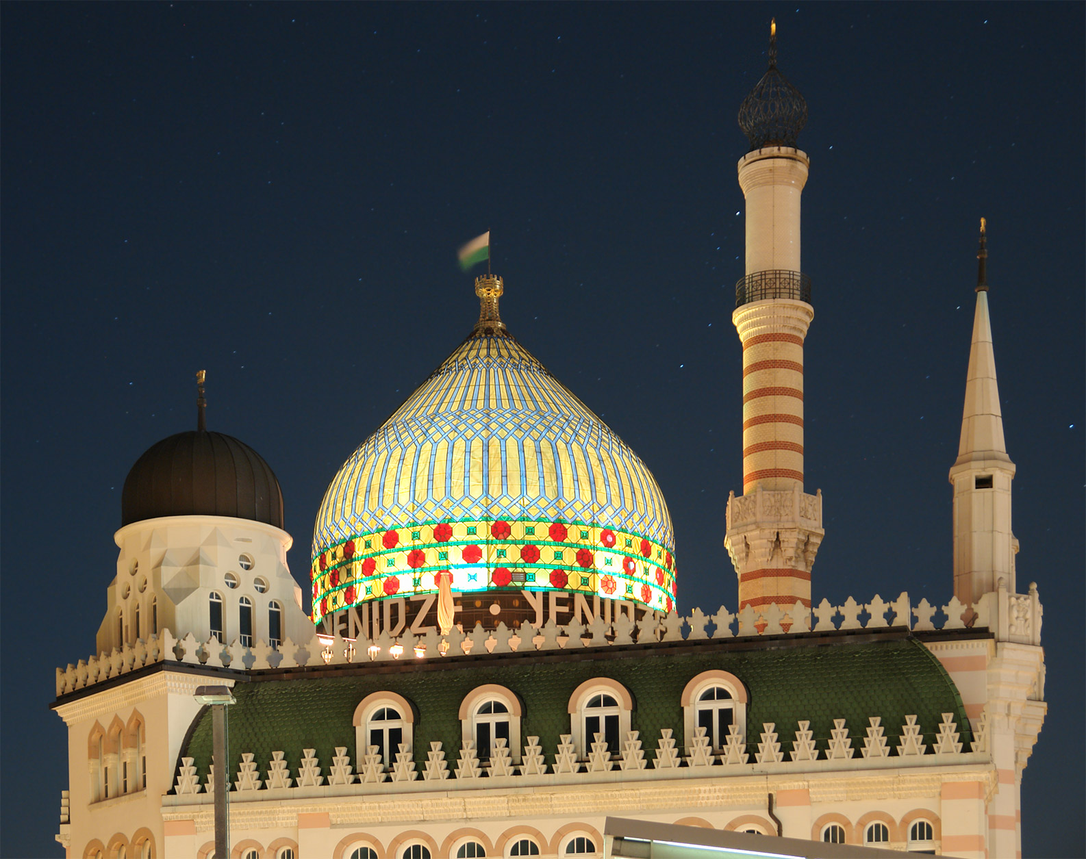 Yenidze